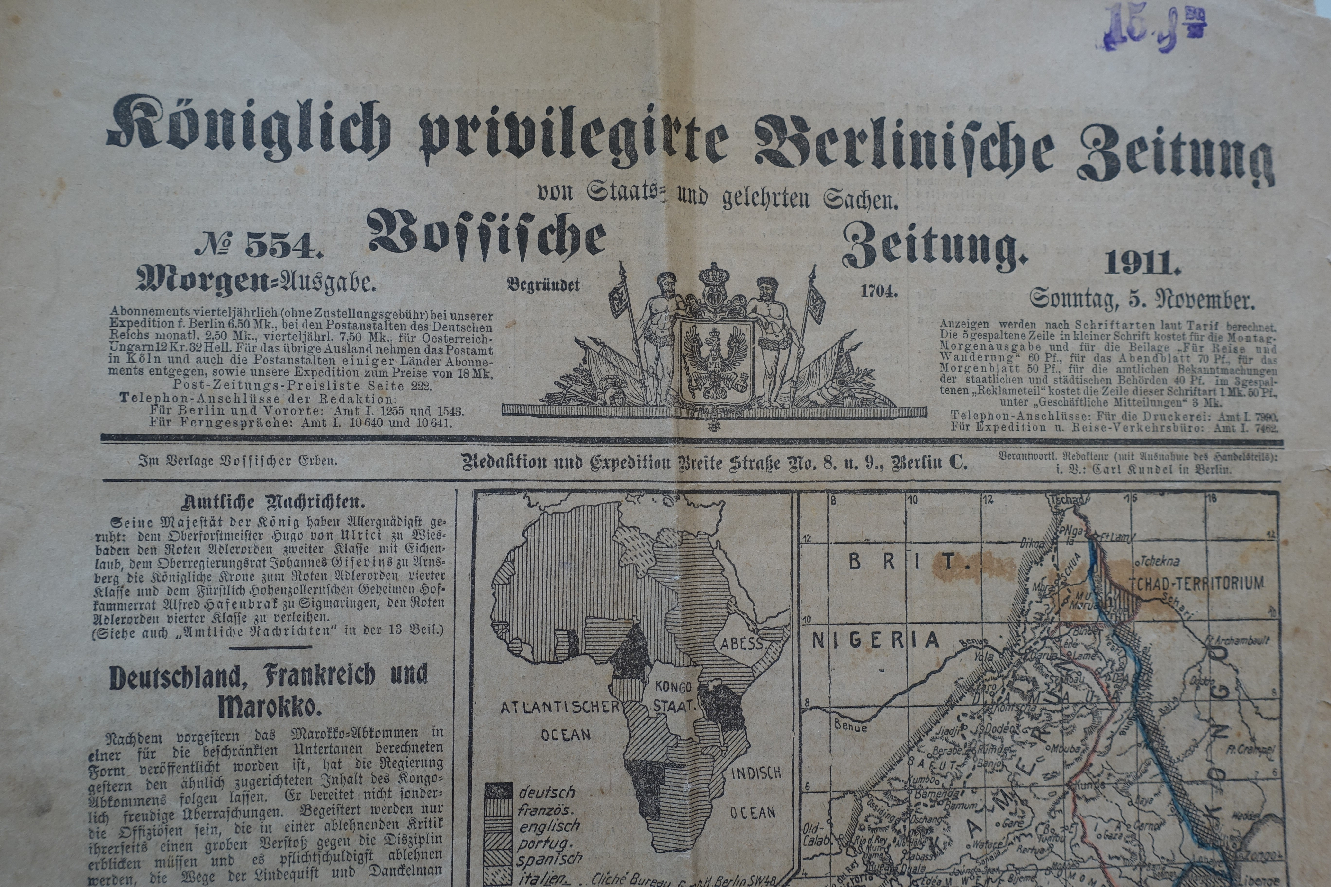 Vossische Zeitung vom 5.11.1911